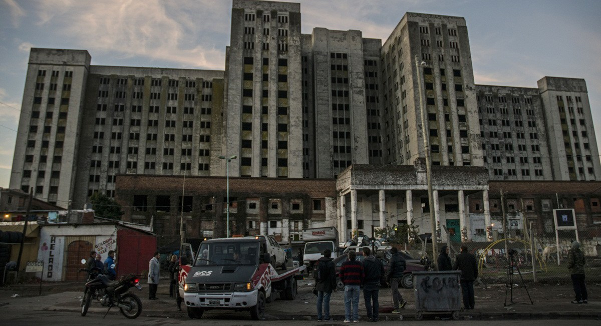 Secuestro de autos Elefante Blanco